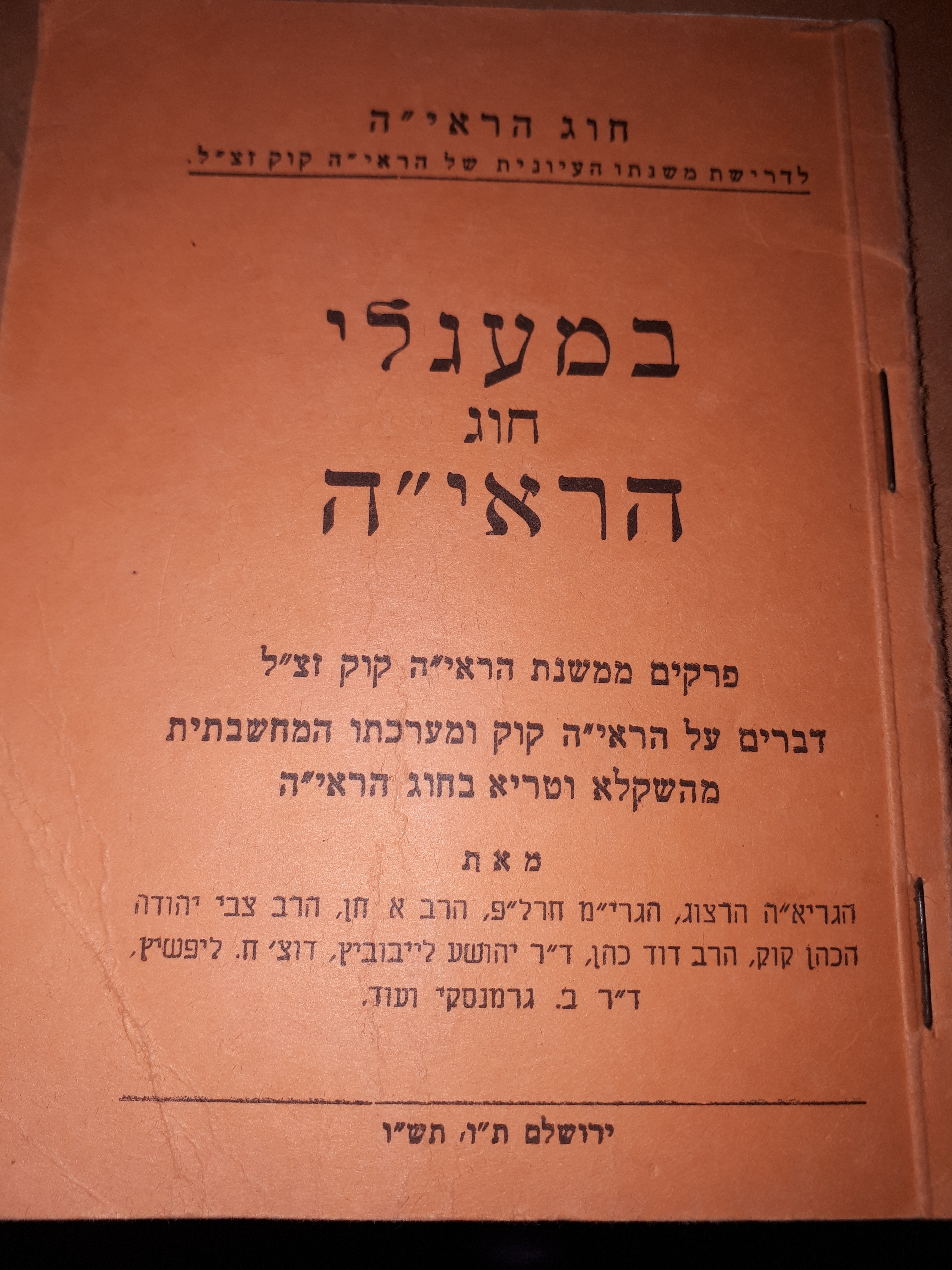 צילום של שער חוברת במעגלי חוג הראי"ה